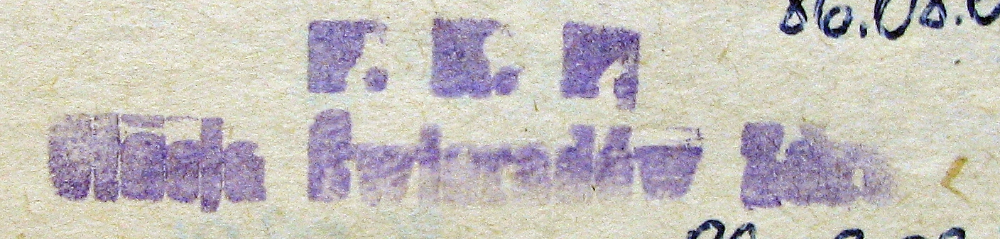 Pieczątka stacji kolejowej w Świeradowie z 1986 r.